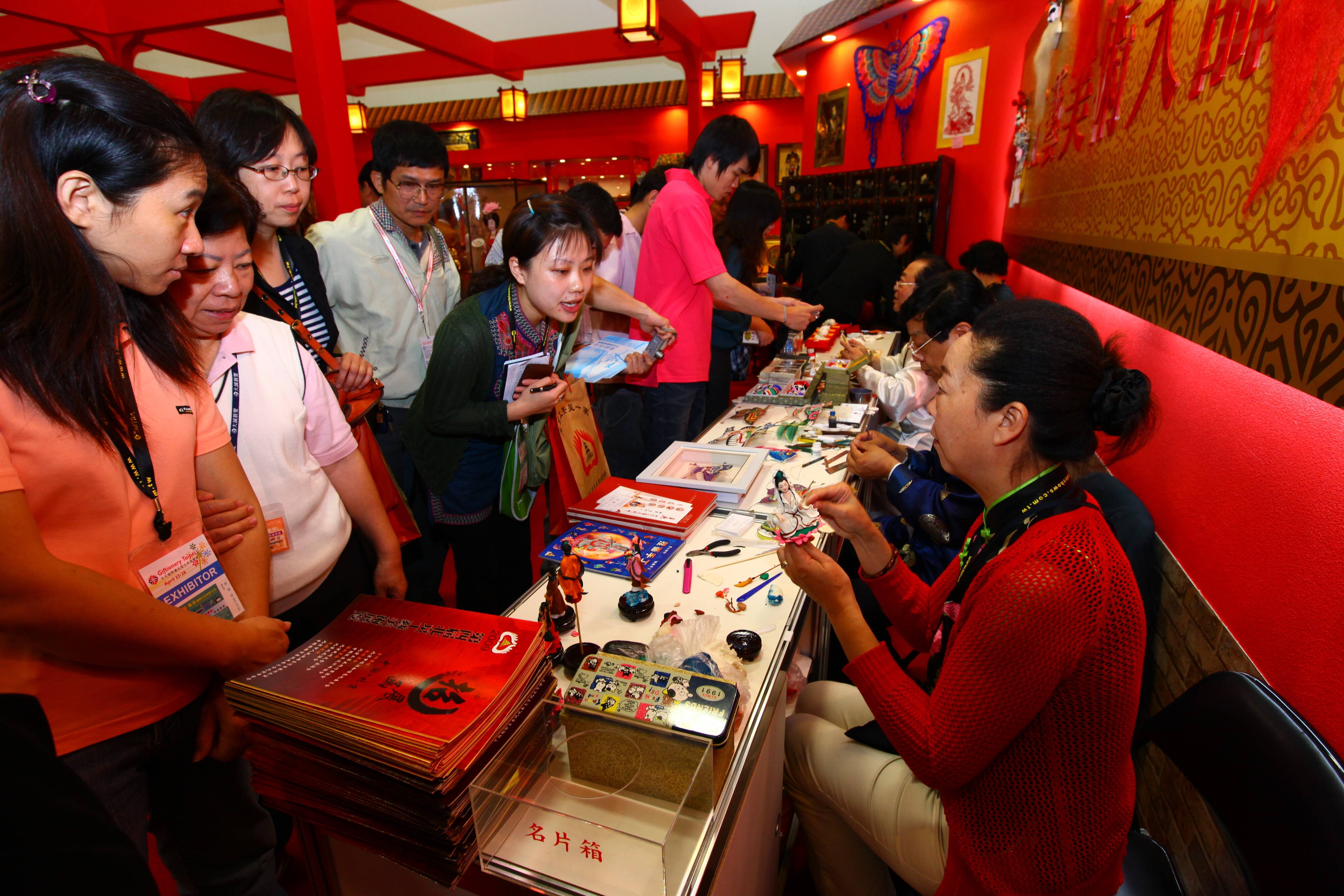 Giftionery Taipei 2009 北京展團攤位